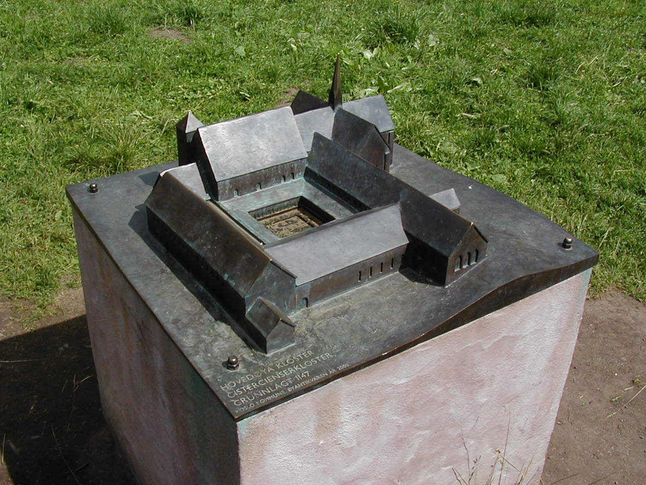 Reconstituted model of the abbey/Maquette reconstituée du monastère